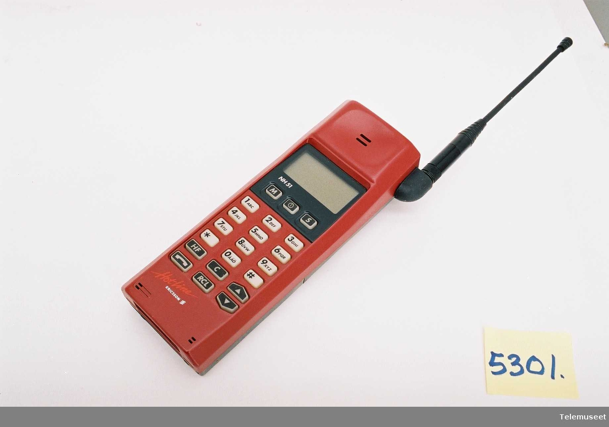 Ericsson Hotline NH51 NMT 900. Var i bruk fra 1992. Pris I 1992 kr. 9.900,- Batteri:(for Ericsson, Taiwan) 6 V 1200mAh Ni-Mh Taletid 120 min Standby tid 69 timer Ladetid hurtiglader 2 timer